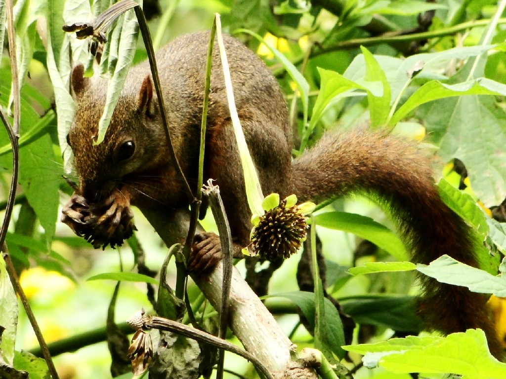 Especie de ardilla del género Sciurus, Henri Pittier, Venezuela.